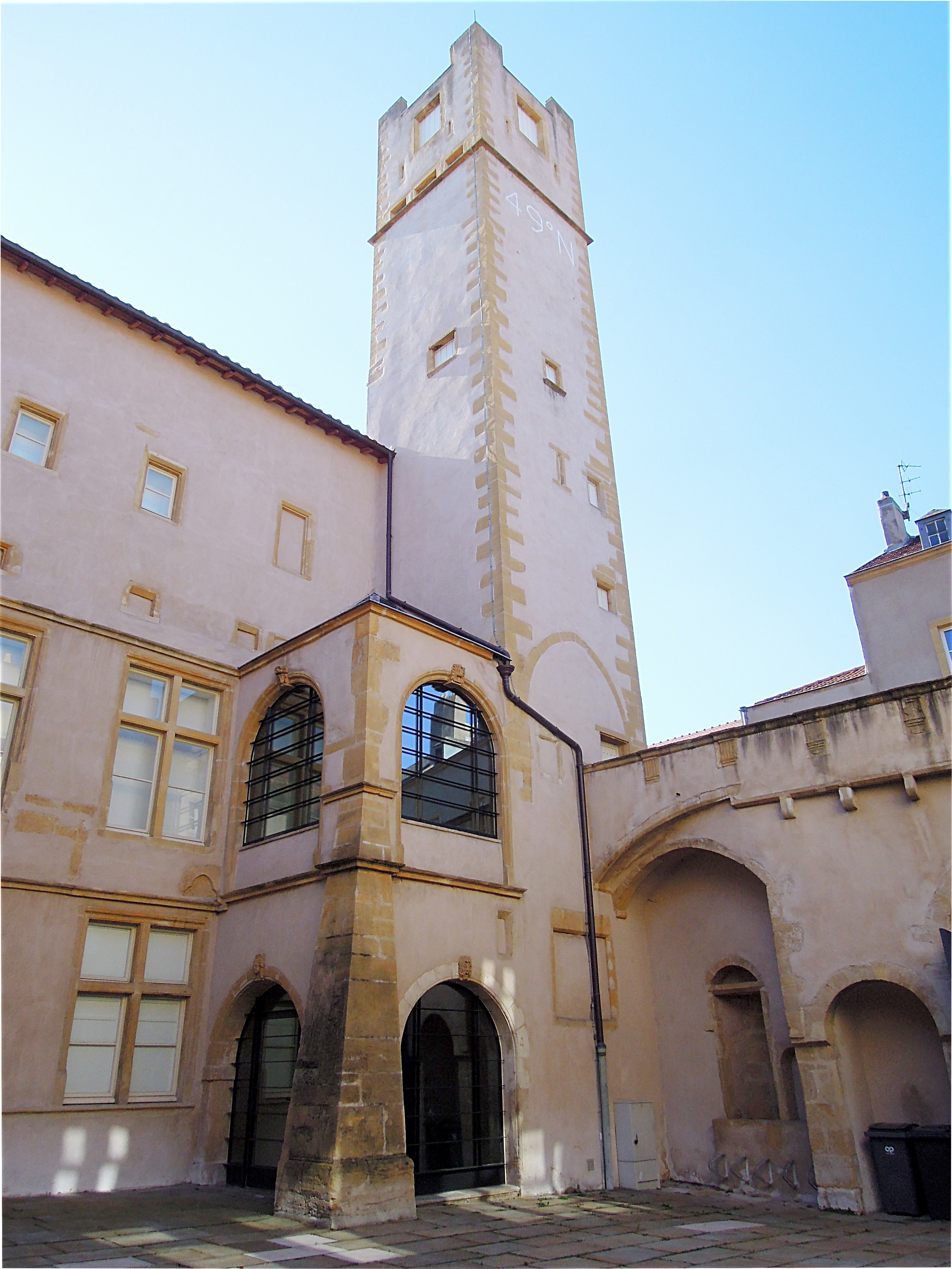 1 bis rue des Trinitaires. Tour de l’hôtel St Livier. Abritant aujourd'hui le Frac de Lorraine. Vue de la cour intérieur. .